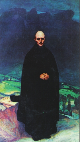 “San Ignazio Loiolakoa”, E. Salaberria